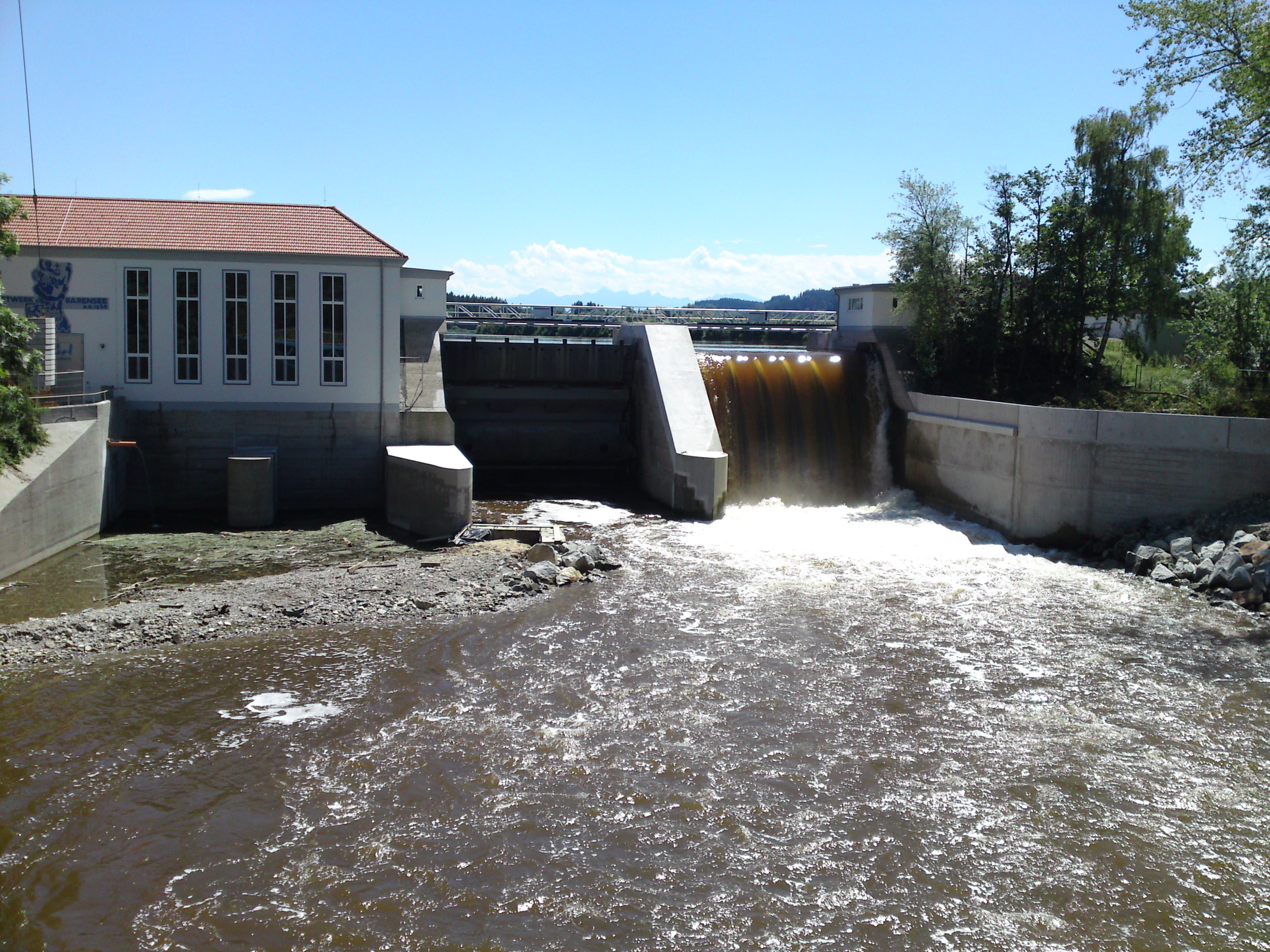 Kraftwerk Hirschell, Staumauer und Überlauf des Bärensee bei Kaufbeuren.